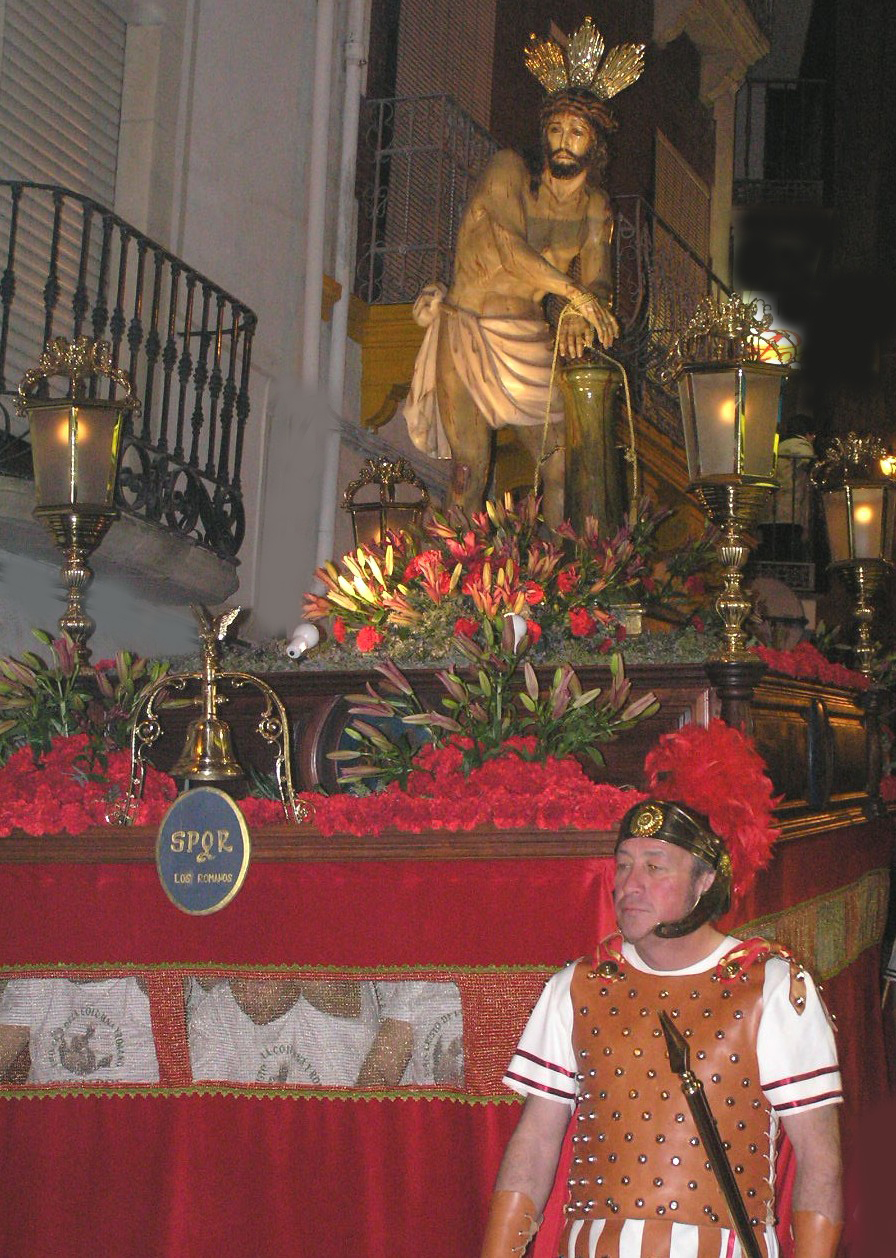 Procesión de Cristo en la Columna y Romanos, el Martes Santo